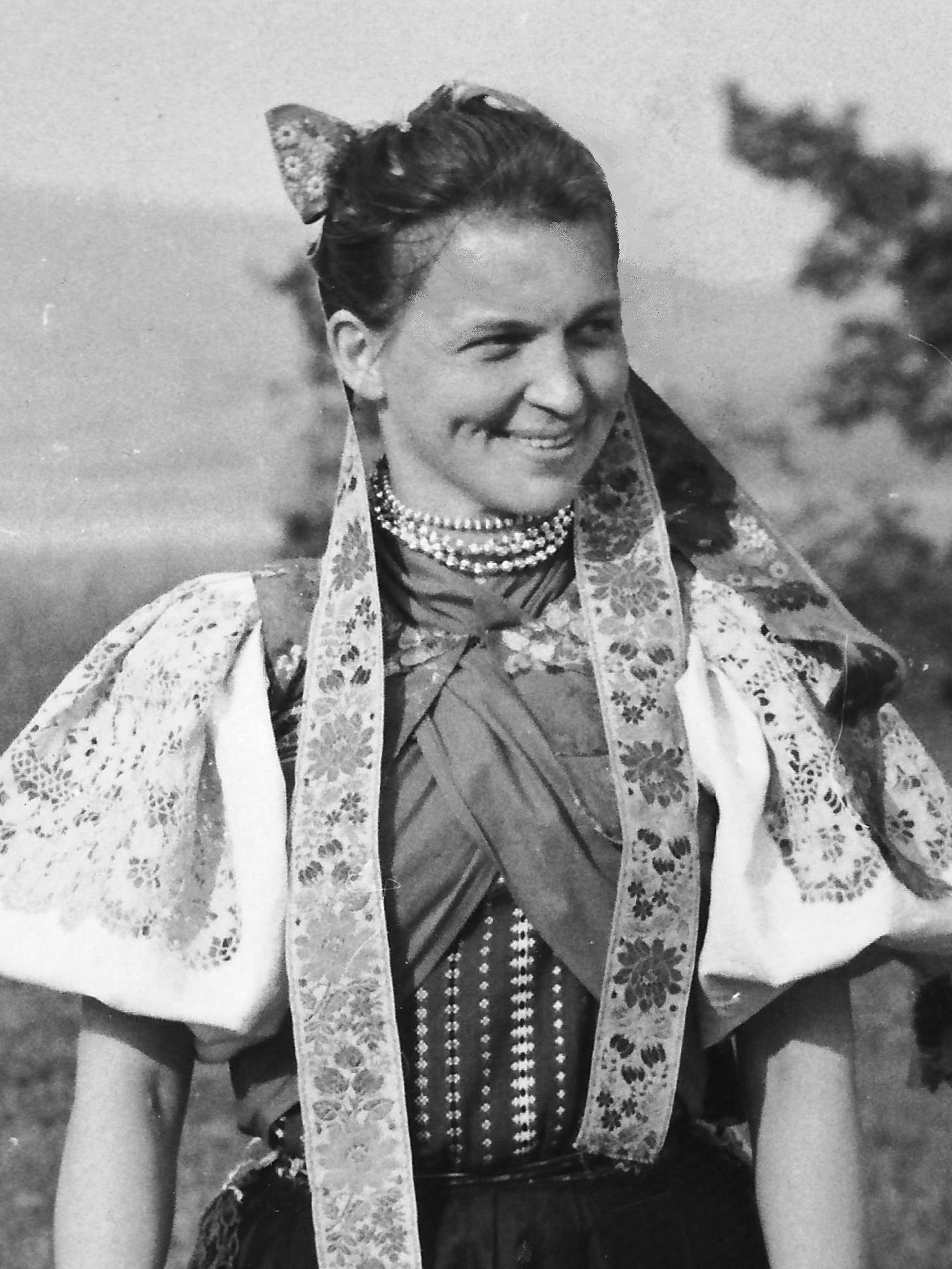 Maria Mazorova